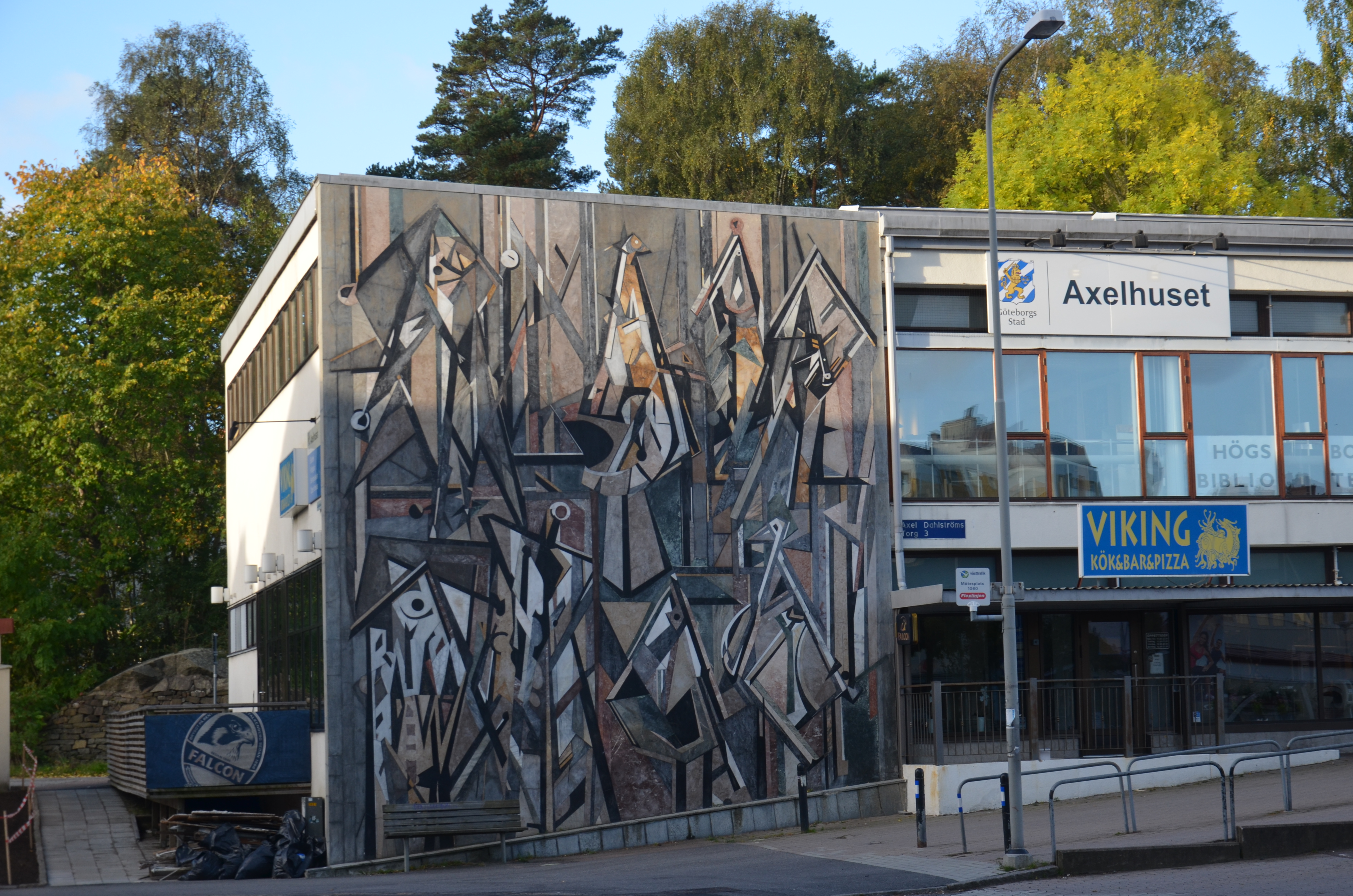 Marmorintarsia på Axel-huset vid Tram stop Axel Dahlströms torg i Högsbo i Göteborg.